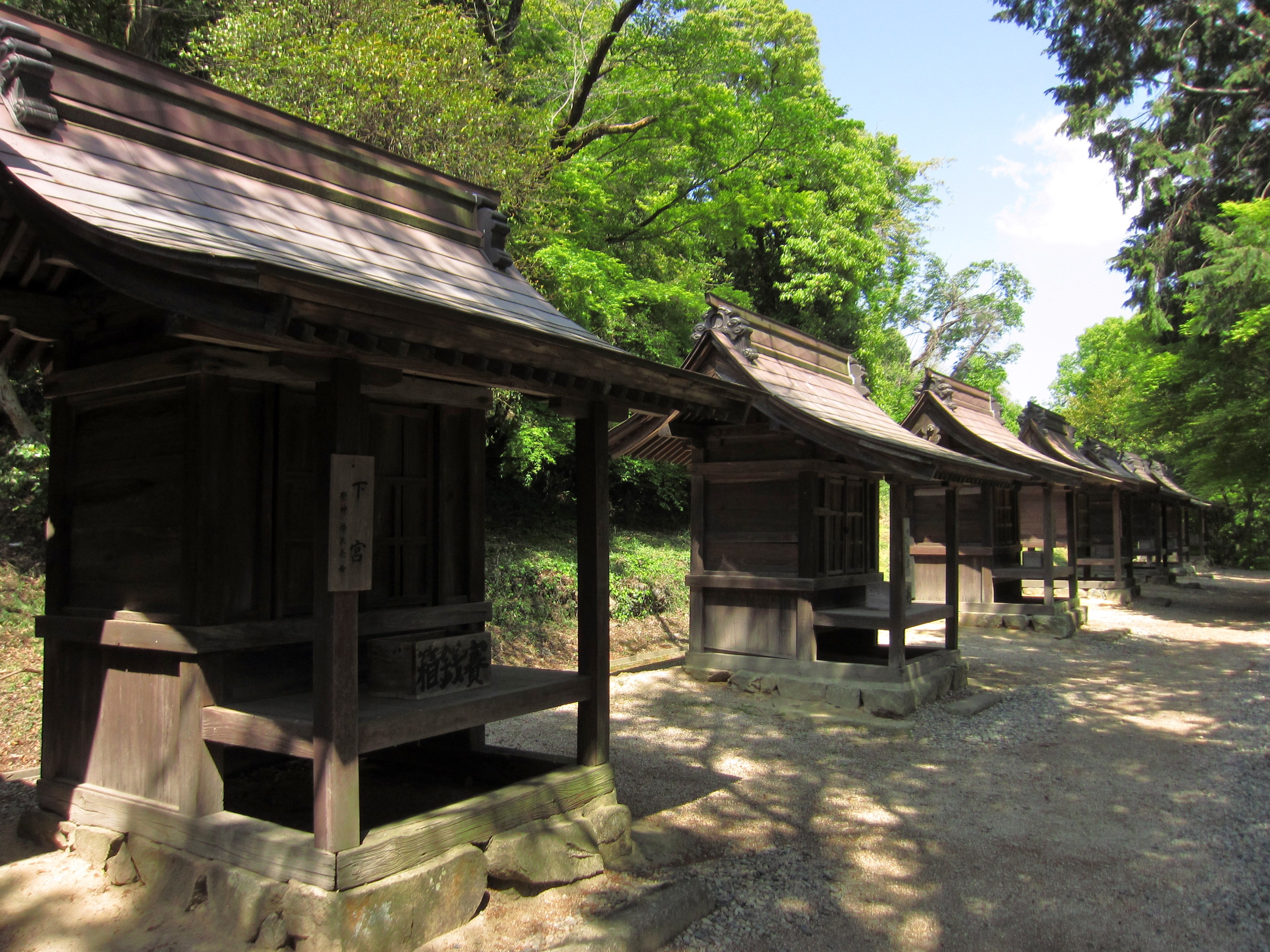 吉備津彦神社 上段の末社群